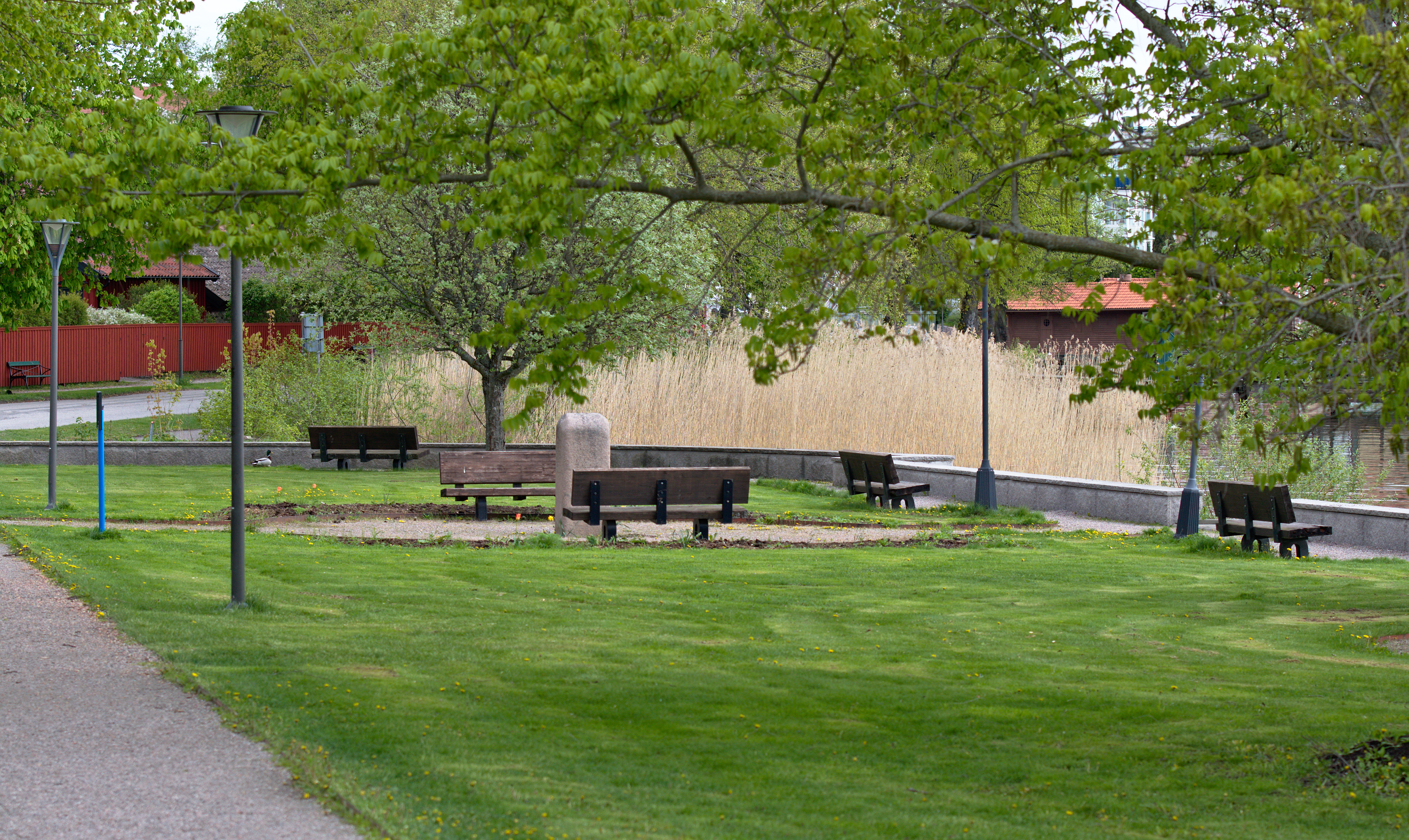 Bo Setterlinds park i centrala Strängnäs.